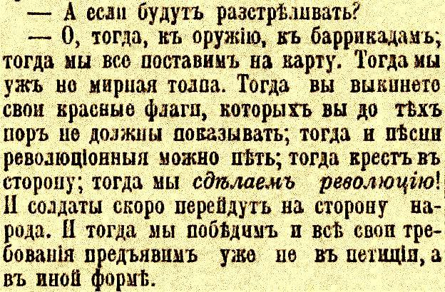 Фрагмент из воспоминаний меньшевика Л. Динина о встрече со священником Гапоном в ночь с 7 на 8 января 1905 года